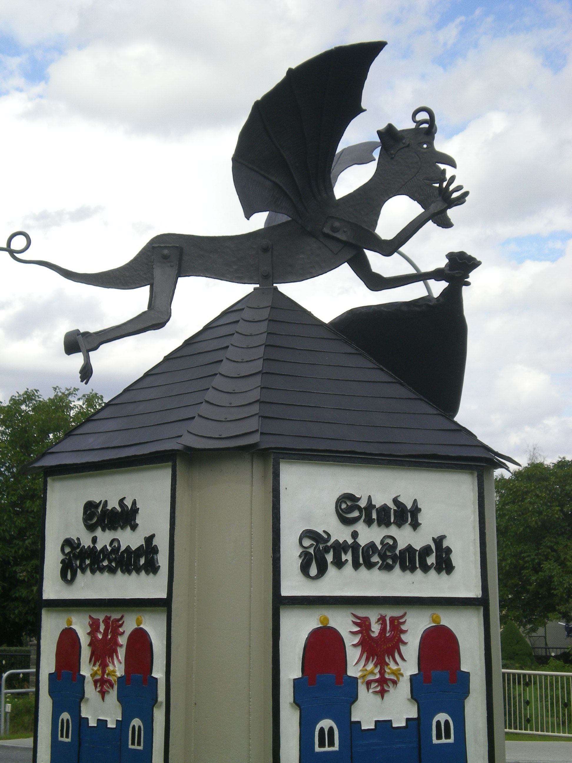 Stadtsymbol von Friesack: Auf der Kreisverkehrsinsel der Bundesstraße 5: Der Teufel mit dem aufgeschlitzten Frie-Sack - siehe dazu den Abschnitt Sage des Lemma Friesack